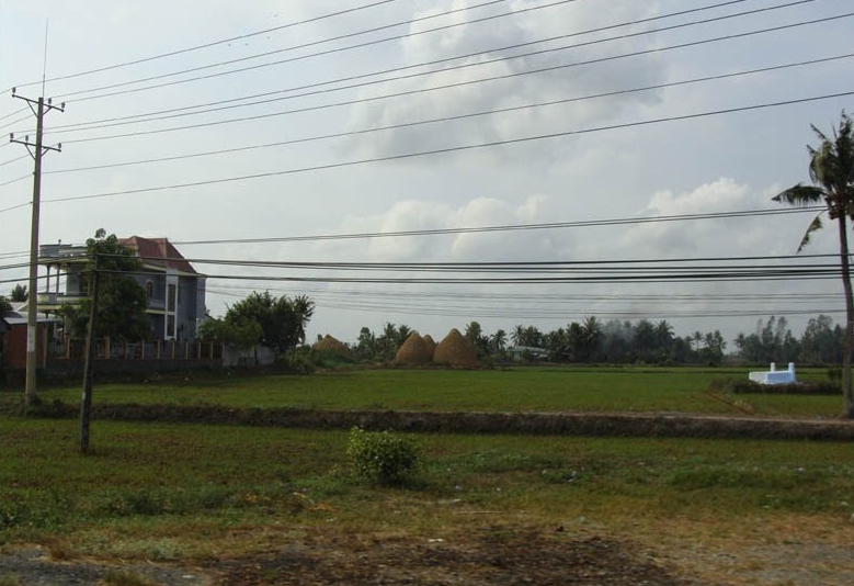 Hình ảnh một vùng quê tại huyện Vũng Liêm, Vĩnh Long